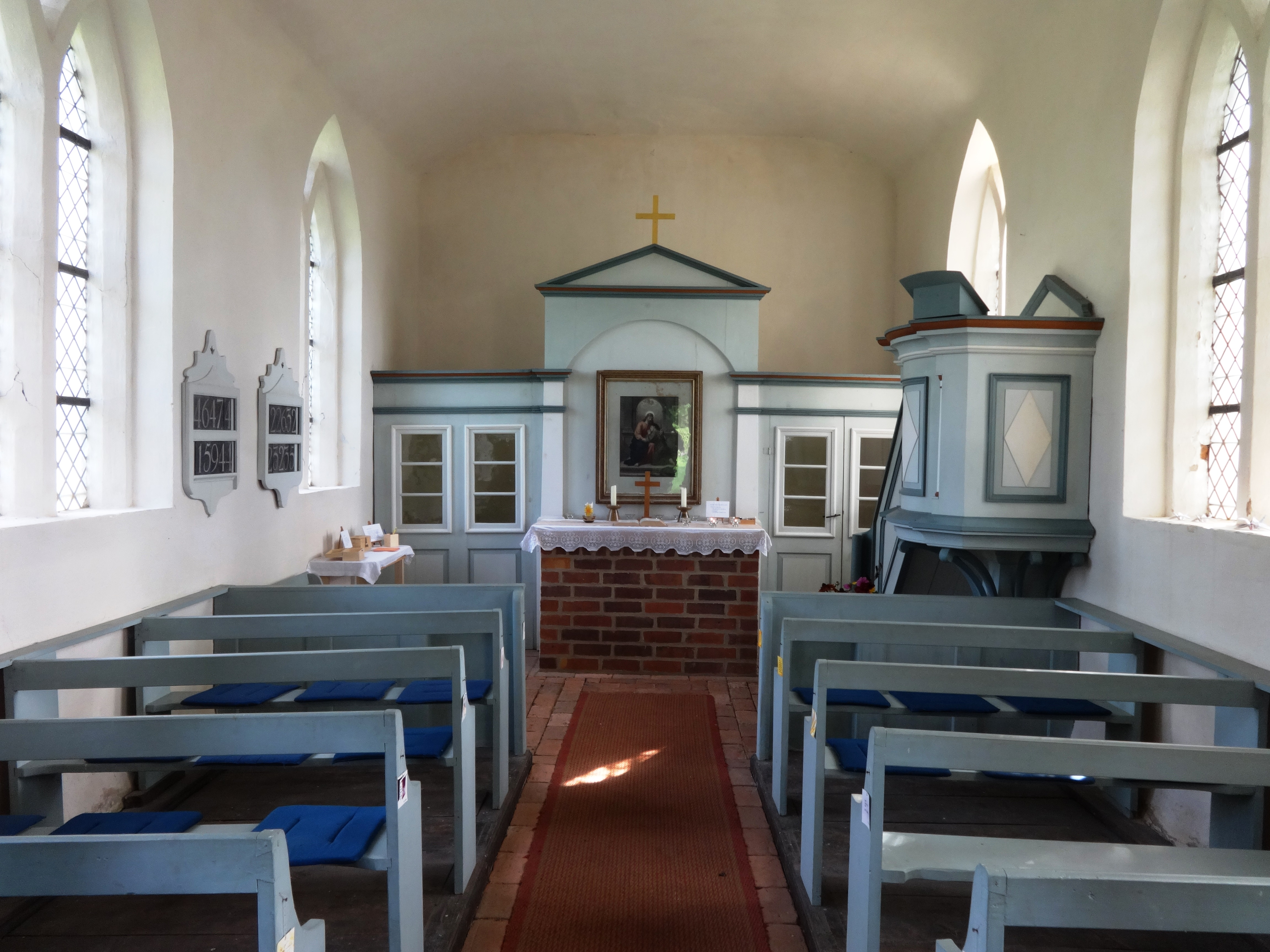 Die Kapelle Jager ist ein Kirchenbau aus dem Jahr 1830 in der Gemeinde Sundhagen im Landkreis Vorpommern-Rügen. Die Kirchenausstattung stammt aus der Bauzeit.